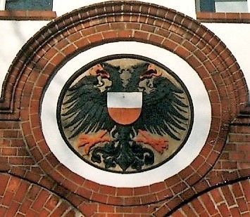 Portal